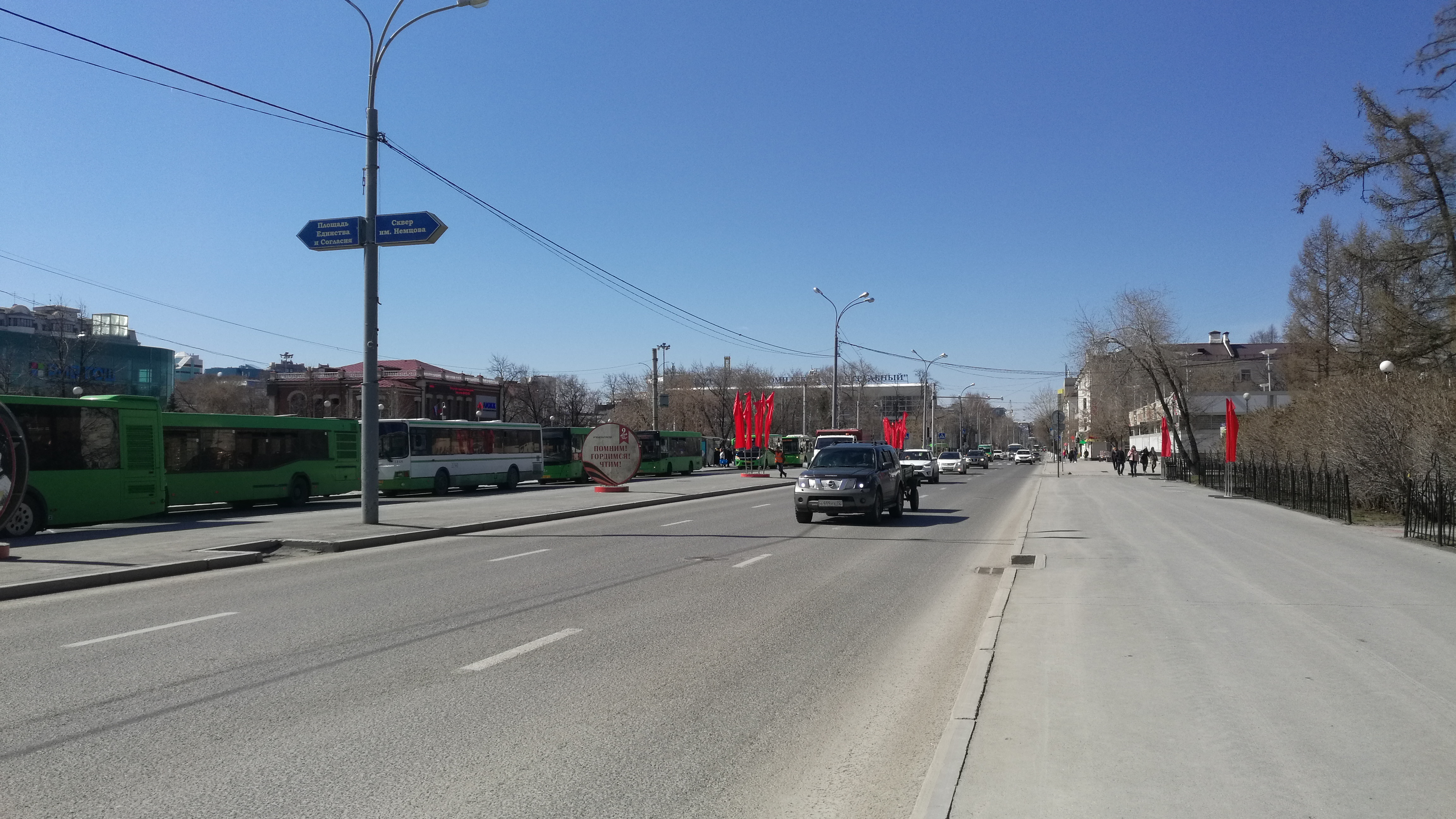 Strato Lenin. Tjumeno, Rusio.